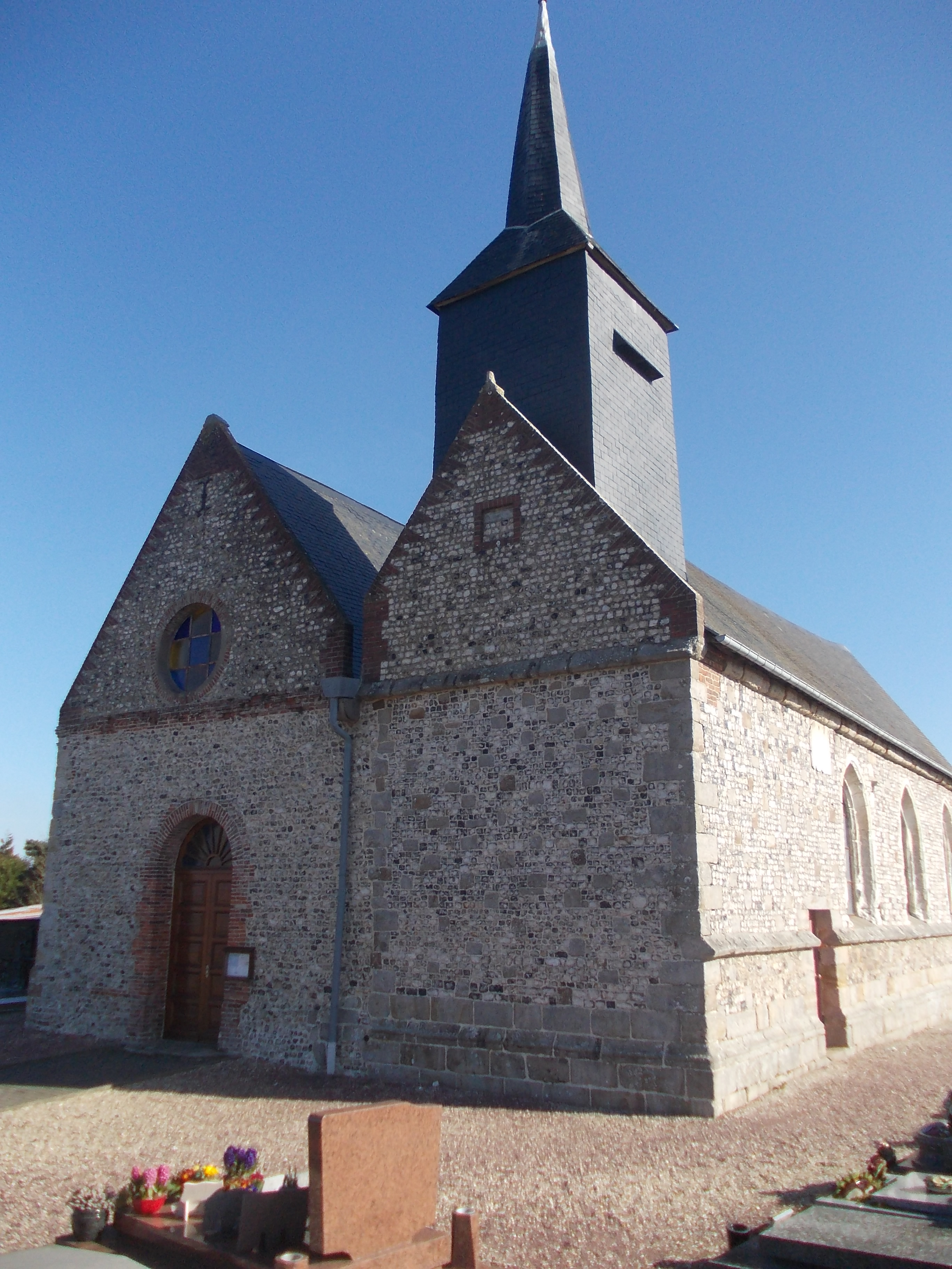 Eglise de la commune de Glicourt